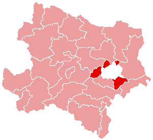 Karte: politischer Bezirk Wien-Umgebung Lizenz: GNU FDL Quelle: Zeichnung plp Datum: de:2007 Ort: Wien